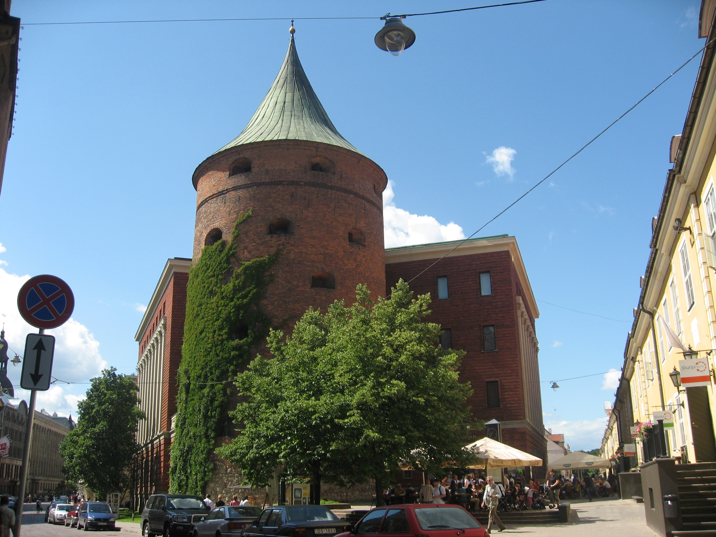 Prašná věž v Rize